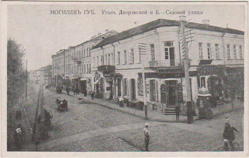 Беларуская (тарашкевіца): Магілёў (Mahiloŭ), вуліца Шляхецкая (vulica Šlachieckaja) каля скрыжаваньня зь Ветранай (vulica Vietranaja)